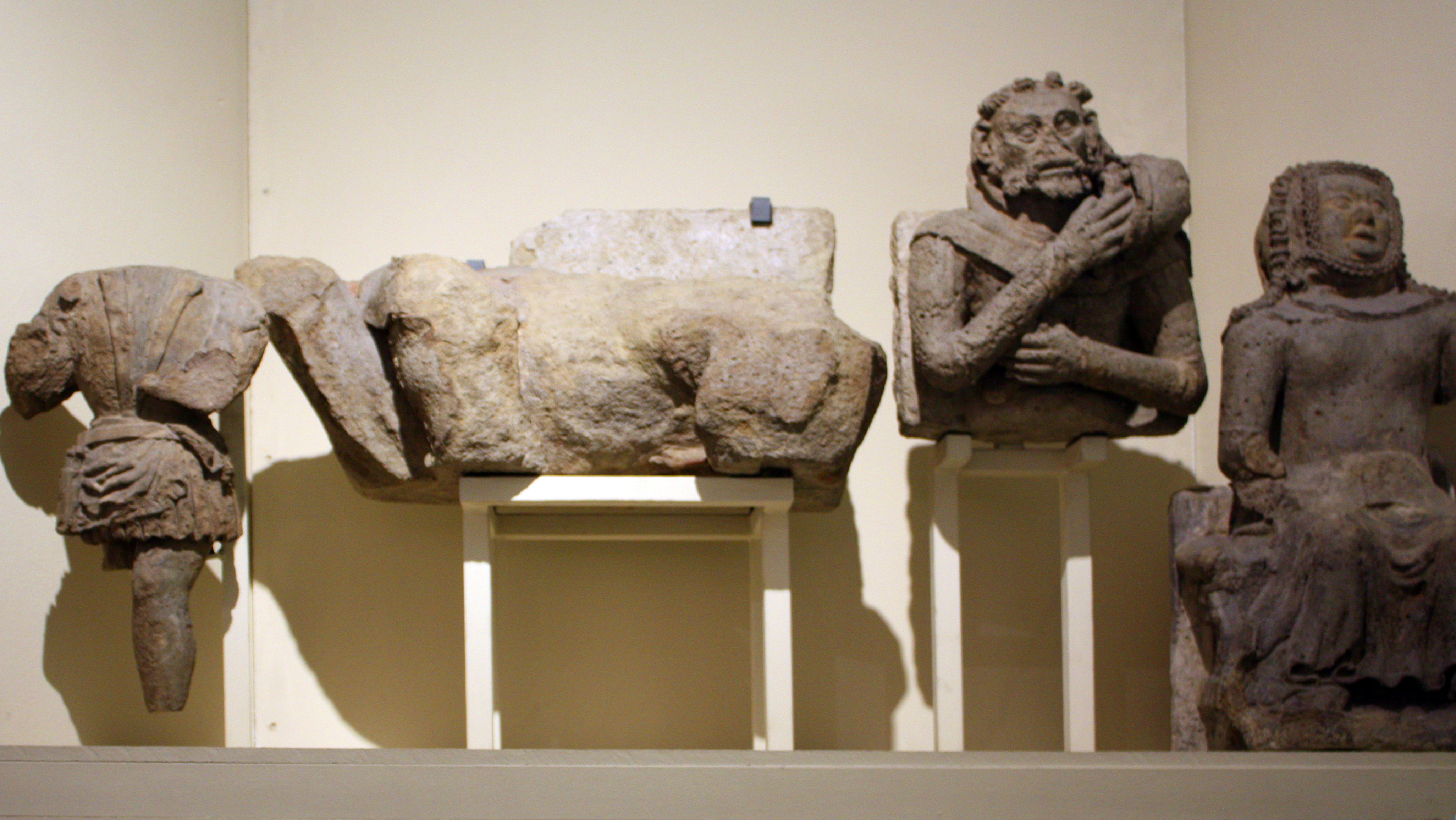 Köln um 1373. Skulpturenreste des Fleischhallentores am Heumarkt (Kölnisches Stadtmuseum)